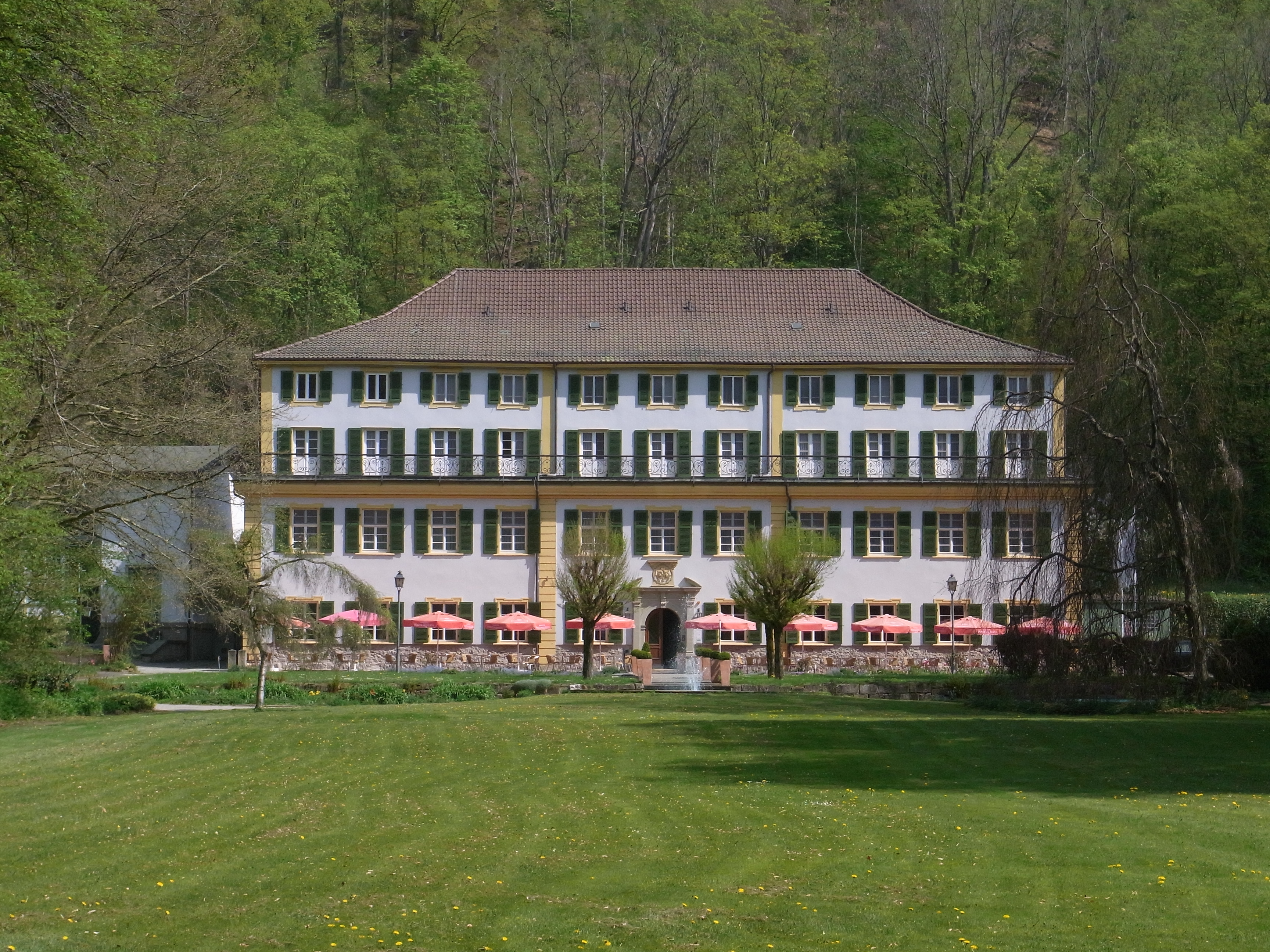 Fürstenbau